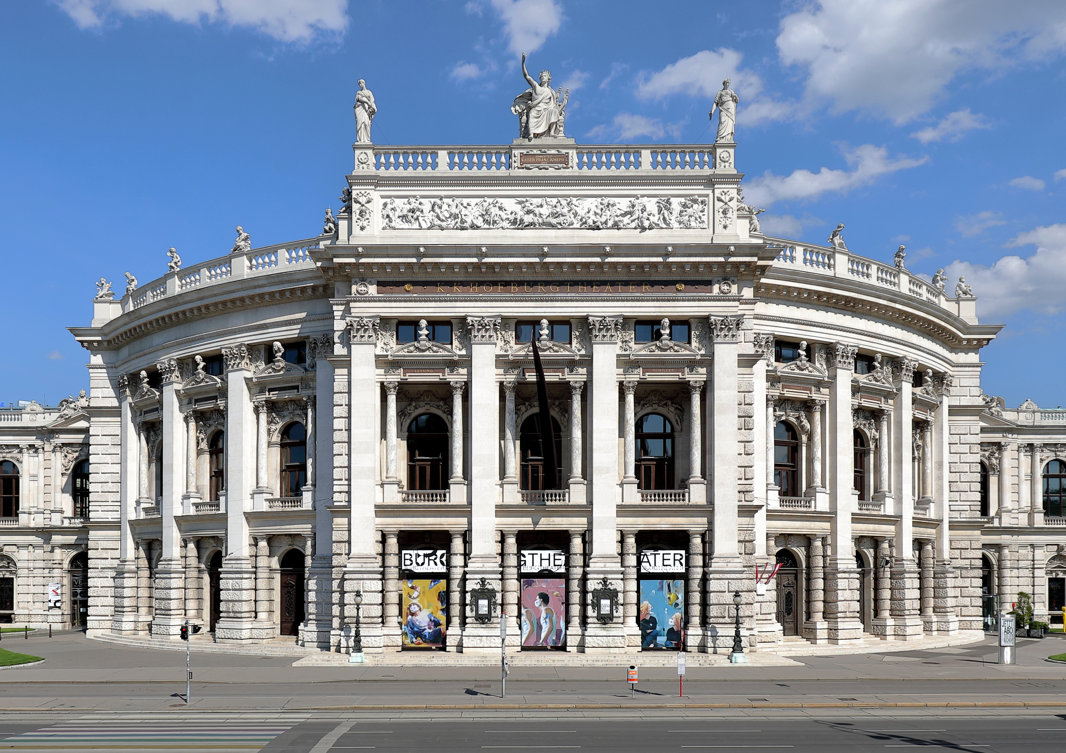 Hauptfassade des Burgtheaters im 1. Wiener Gemeindebezirk Innere Stadt.Das Theatergebäude wurde nach Plänen von Gottfried Semper und Carl von Hasenauer (Innengestaltung) errichtet. Der Spatenstich erfolgte am 16. Dezember 1874 und am 14. Oktober 1888 fand mit Franz Grillparzers „Esther“ und Friedrich Schillers „Wallensteins Lager“ die Eröffnung statt. Der Zuschauerraum musste wegen schlechter Akustik 1897 umgebaut werden.